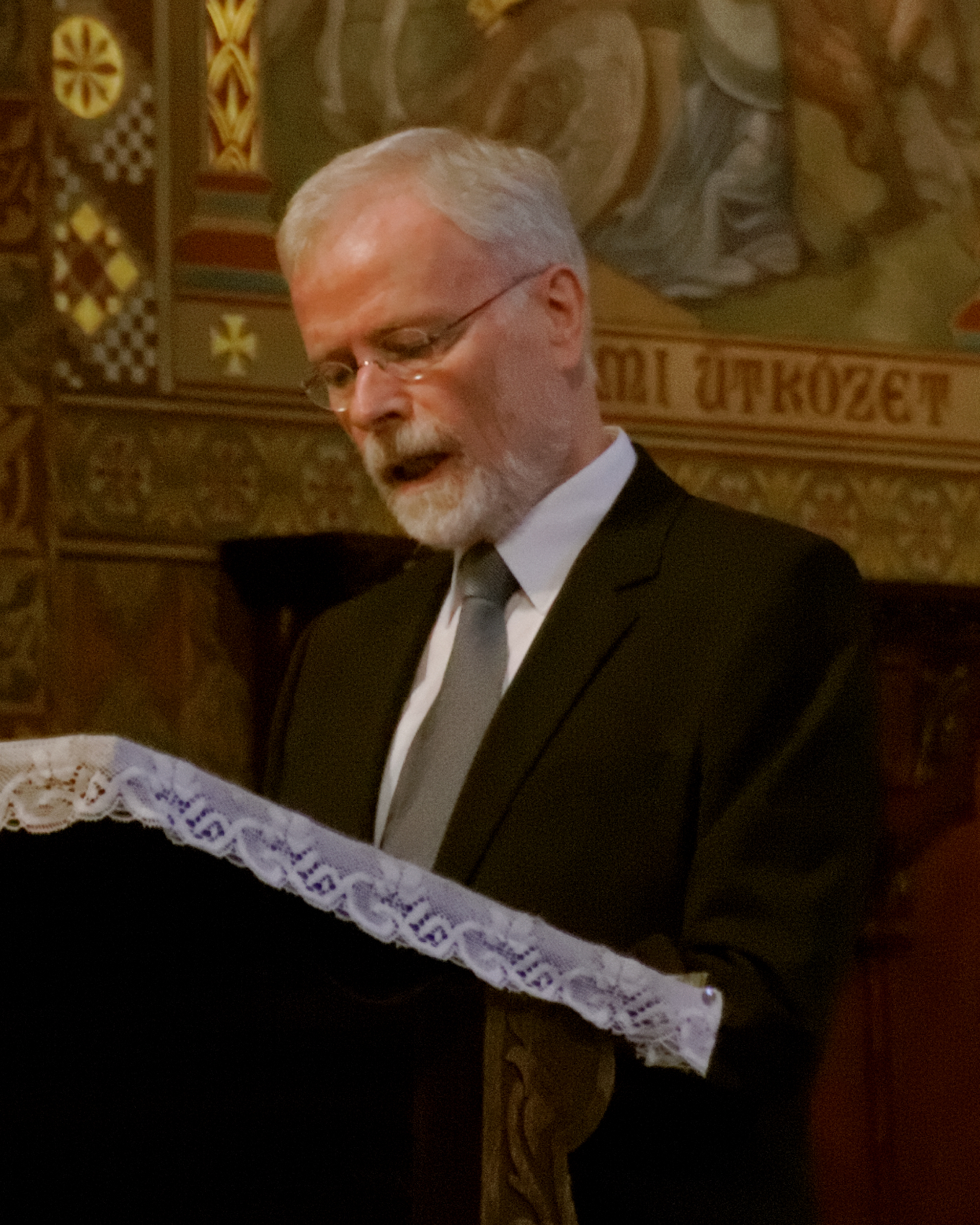 Prof. Hans Hermann Henrix in der Matthiaskirche in Budapest 2013